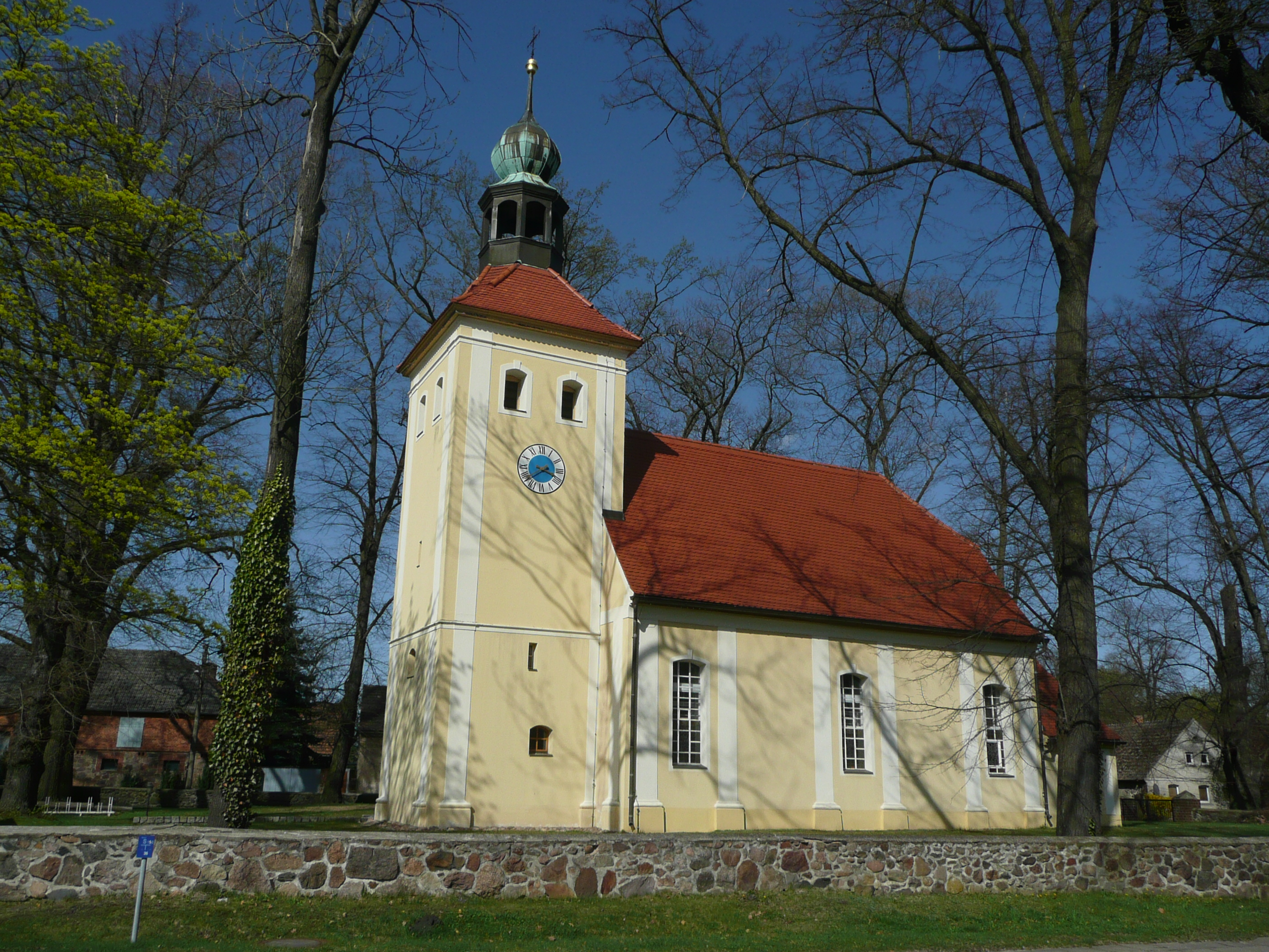 Die Evangelische Kirche in Welzow wurde 1740 erbaut.